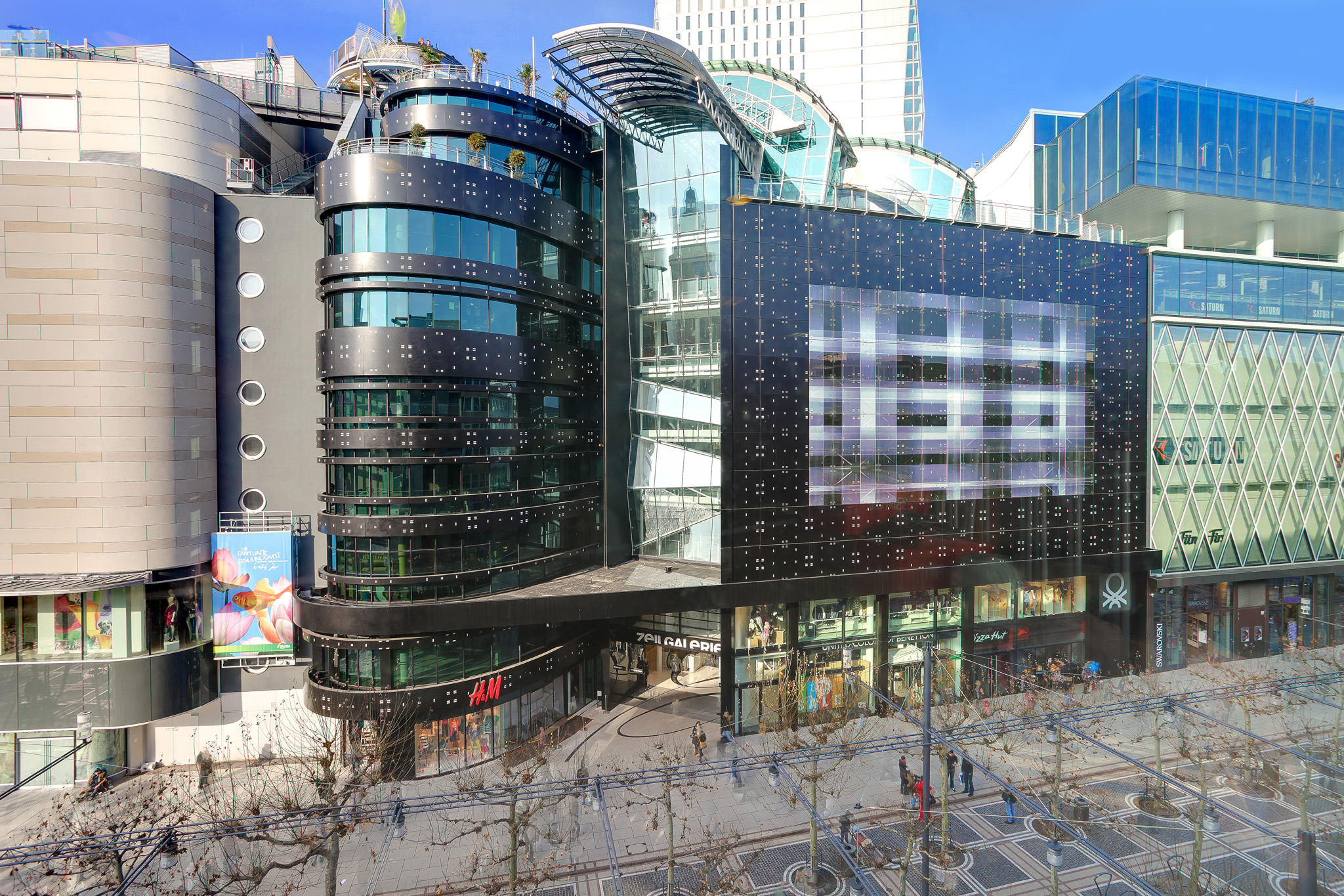 Ein 260 Quadratmeter großer Medienscreen, der mit rund 14.000 Leuchtdioden ausgestattet ist.